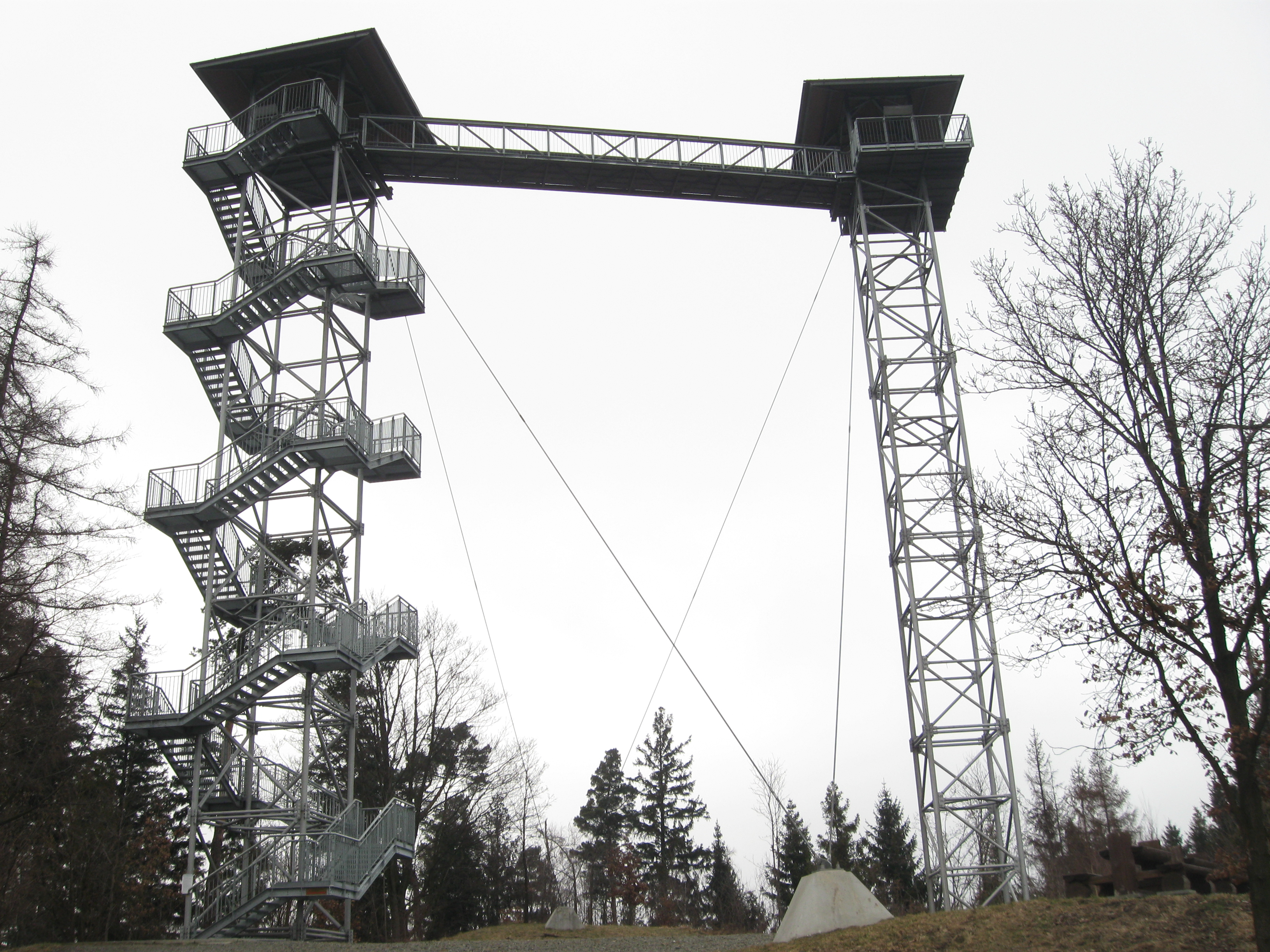 Rozhledna Hraniční vrch na česko-polské hranici.